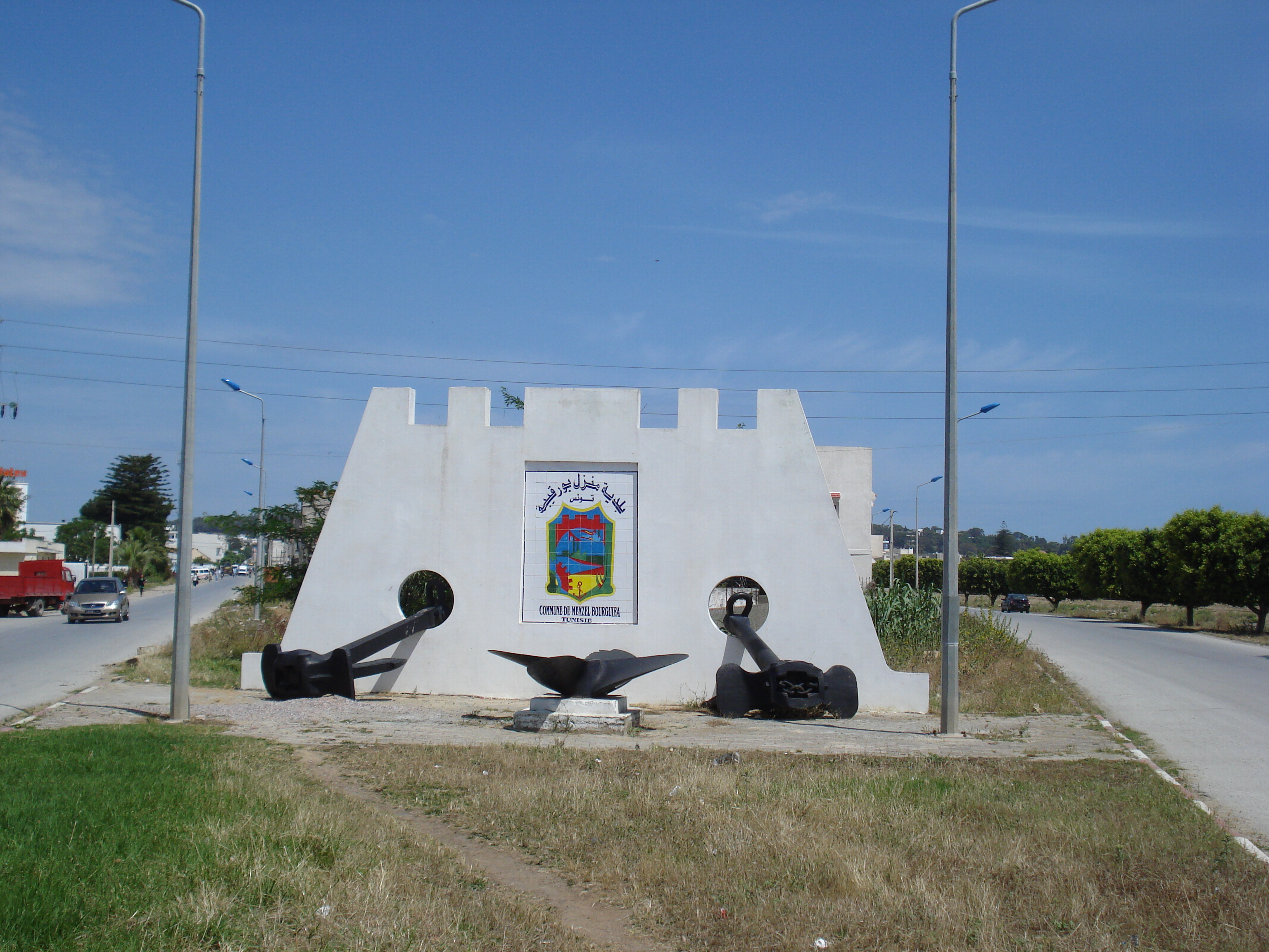 Entrée de Menzel Bourguiba, Tunisie